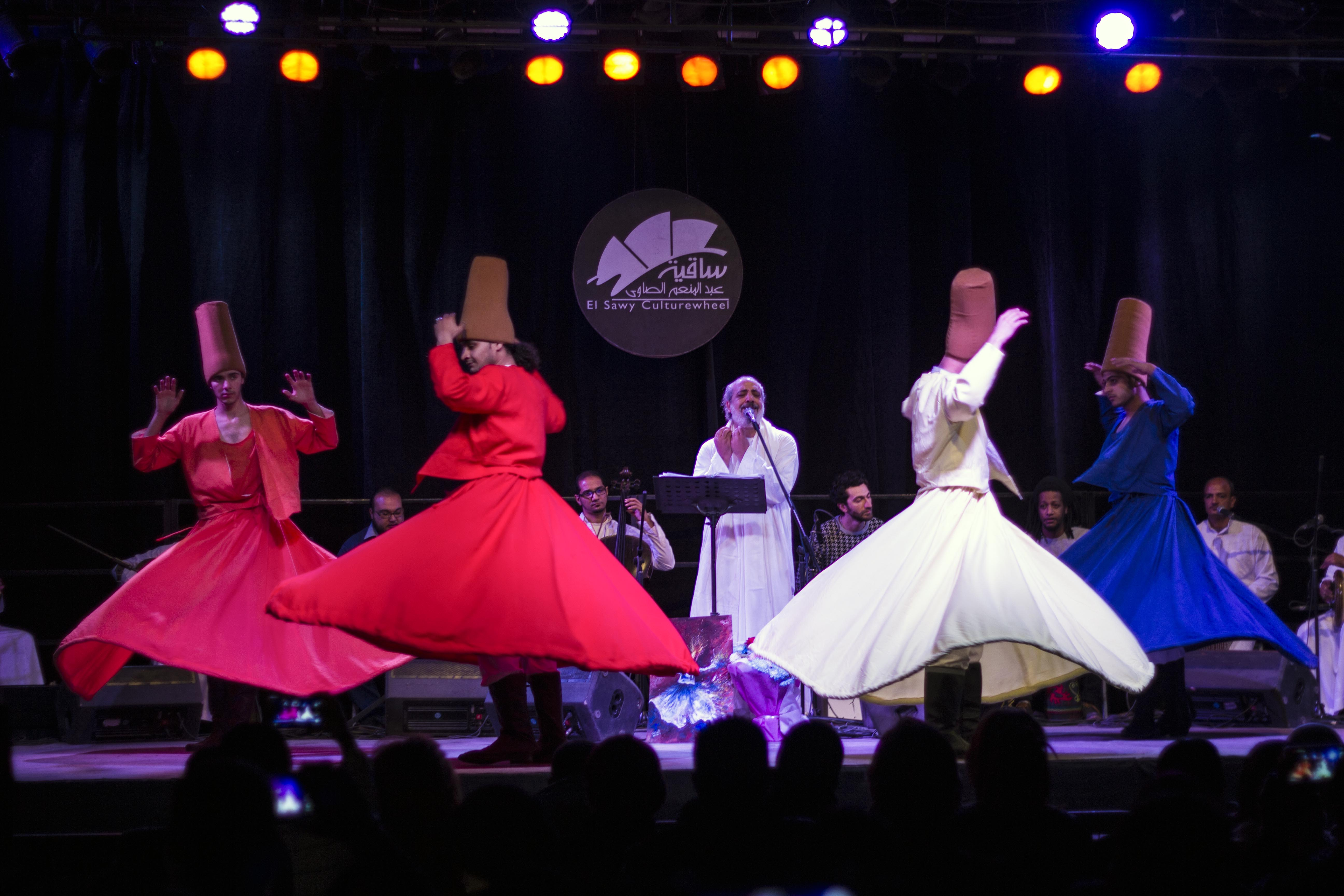 فرقة المولوية المصرية This is an image of music and dance from Egypt